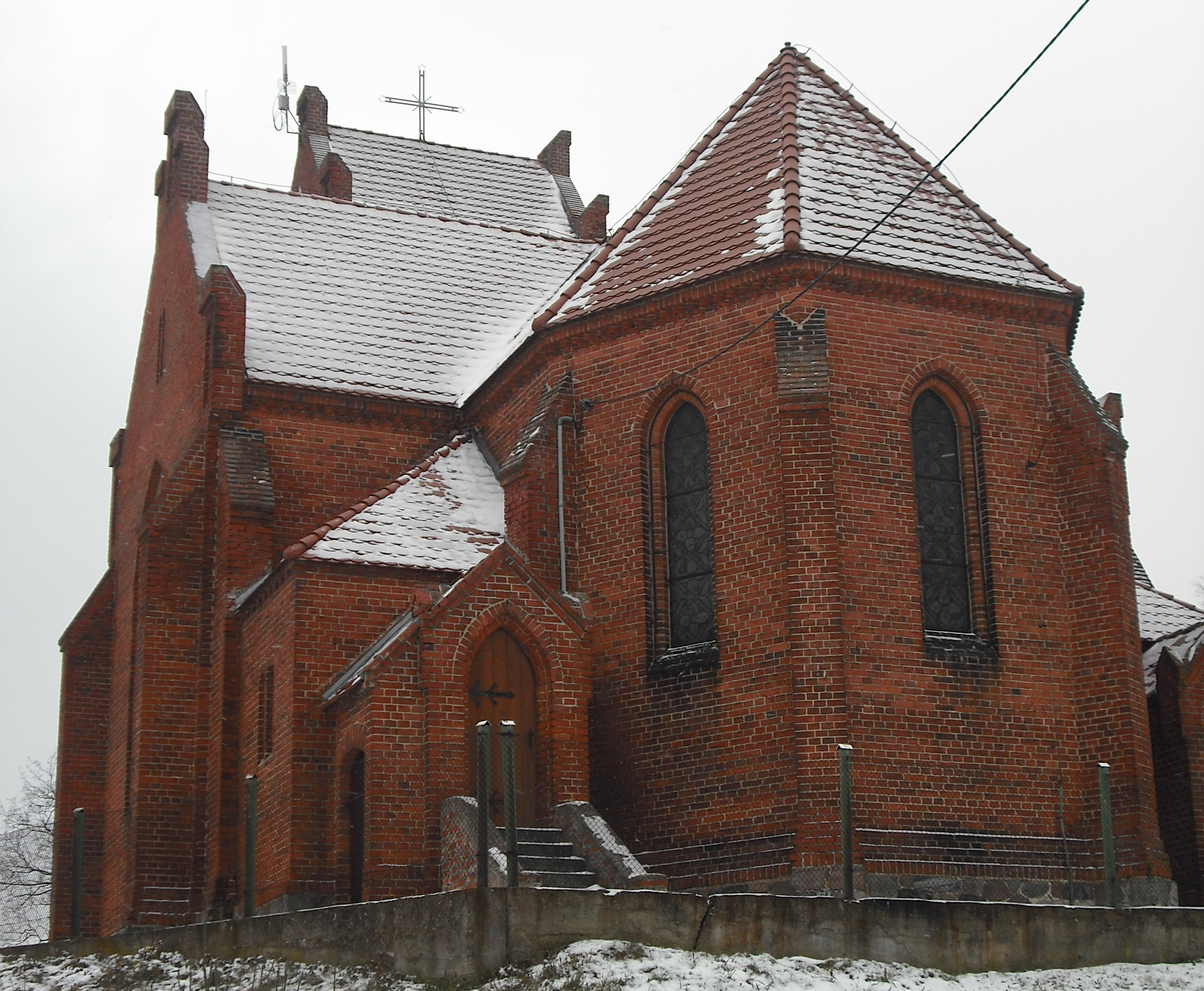 Kościół w Chomętowie